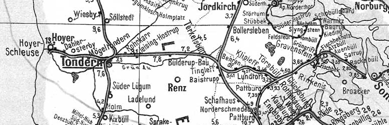 Südjütische_Querbahn_Großer_Atlas_der_Eisenbahnen_von_Mitteleuropa_1902